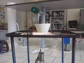 Utilizzo di un bunsen, di un treppiede e di un triangolo di refrattario per scaldare un crogiolo